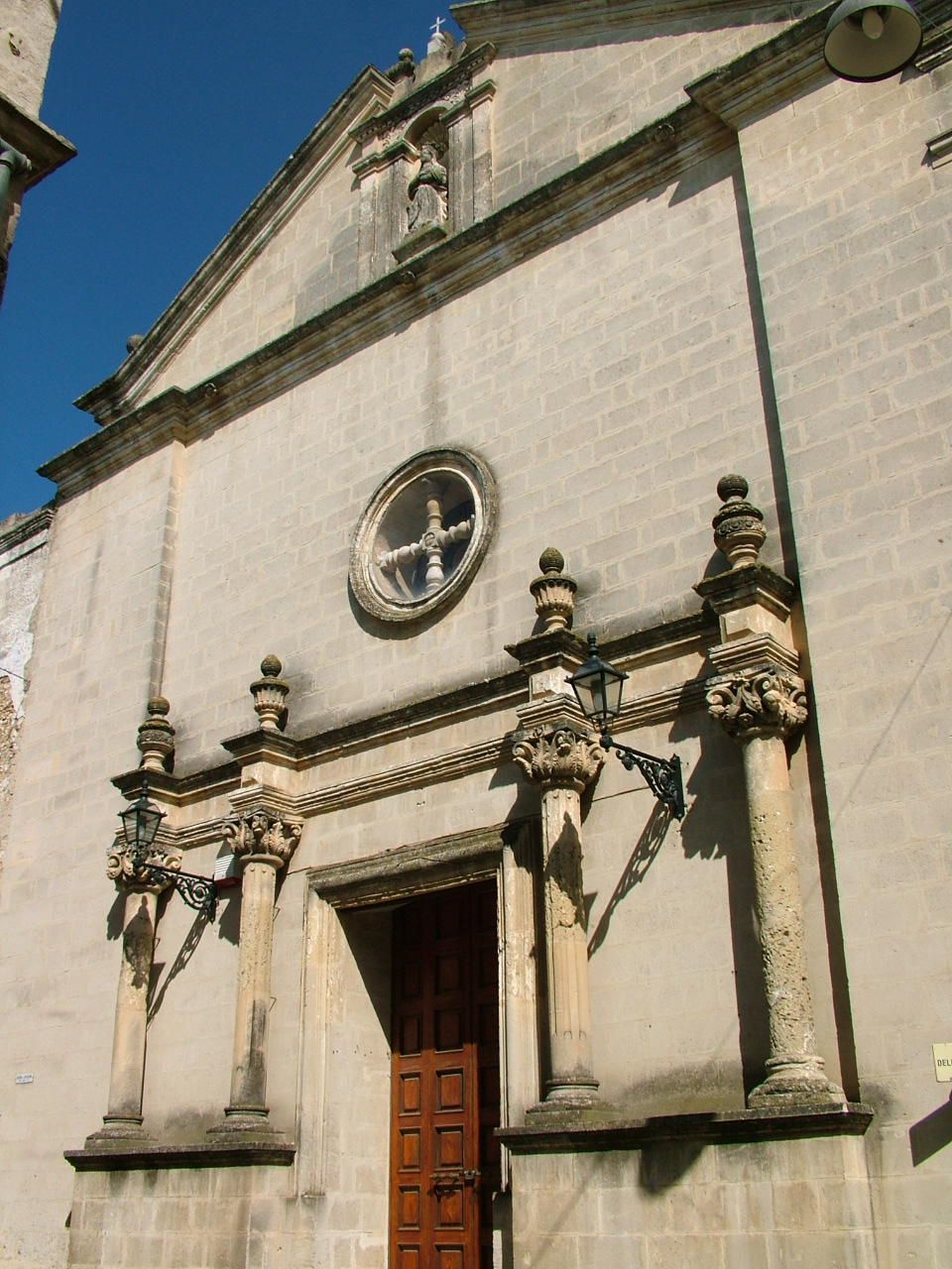 Chiesa S.S Concezione Montescaglioso